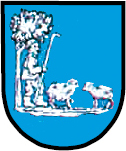 Herb Jaśkowic (gmina Zbrosławice, powiat tarnogórski, województwo śląskie, Polska)